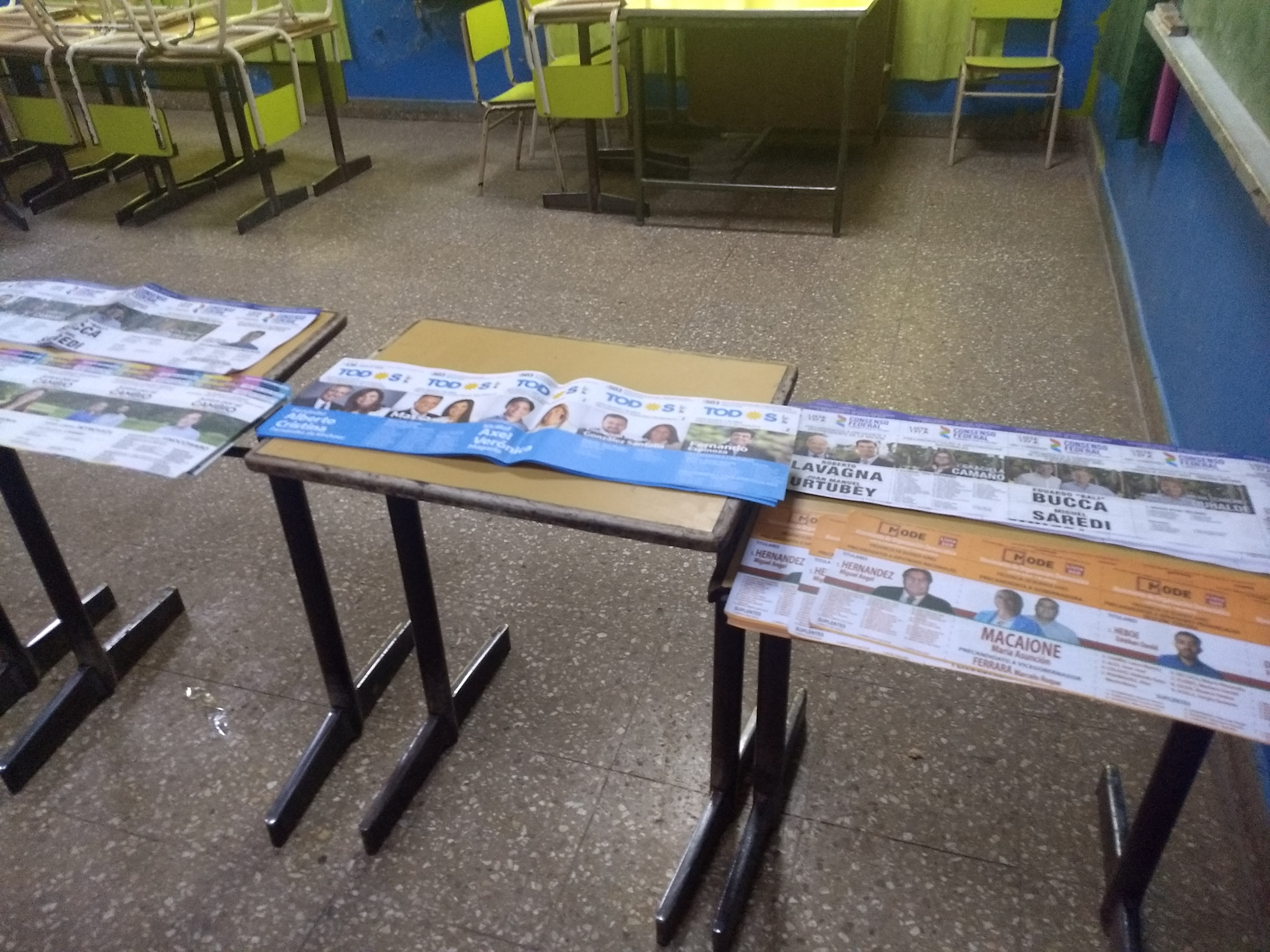 Boletas en un cuarto oscuro de la escuela N° 175 en Rafael Castillo, partido de La Matanza, provincia de Buenos Aires. Elecciones primarias de Argentina de 2019.